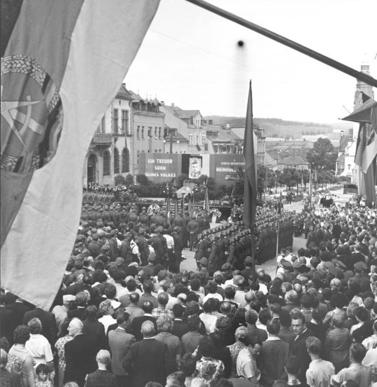 Zentralbild / Gahlbeck 22.6.62 Bez. Karl-Marx-Stadt: Reinhold Paul Huhn mit militärischen Ehren beigesetzt. - Der von faschistischen Banditen heimtückisch ermordete Unteroffizier der Grenzsicherungskräfte Reinhold Paul Huhn wurde am 22.6.62 in seiner vogtländischen Heimatstadt mit allen militärischen Ehren feierlich beigesetzt. Auf dem Ernst-Thälmann-Platz (unser Foto) der Textilarbeiterstadt hatten sich Tausende Einwohner sowie Abordnungen aus vielen Gemeinden des Kreises Oelsnitz eingefunden, um dem tapferen Patrioten, der auch für sie auf Friedenswacht gestanden hatte, das letzte Geleit zu geben. UBz: Tausende nahmen auf dem Ernst-Thälmann-Platz in Adorf von dem tapferen Patrioten Reinhold Huhn Abschied.